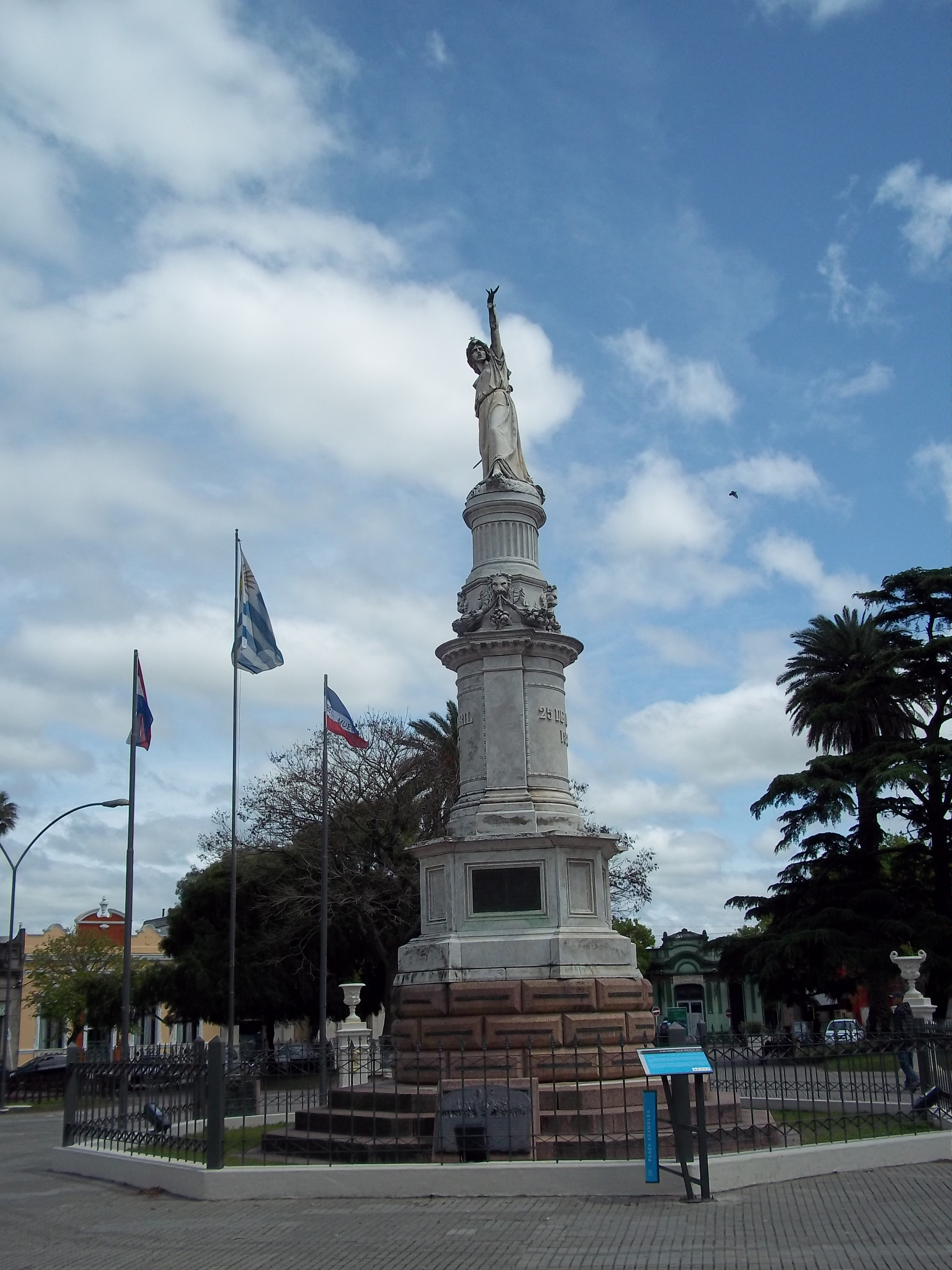 Monumento a la Independencia Nacional, ubicado en el centro de la Plaza 25 de agosto de 1825, en la ciudad de Florida, departamento de Florida, Uruguay. Fue creada por el escultor Juan Ferrari, en el año 1879.